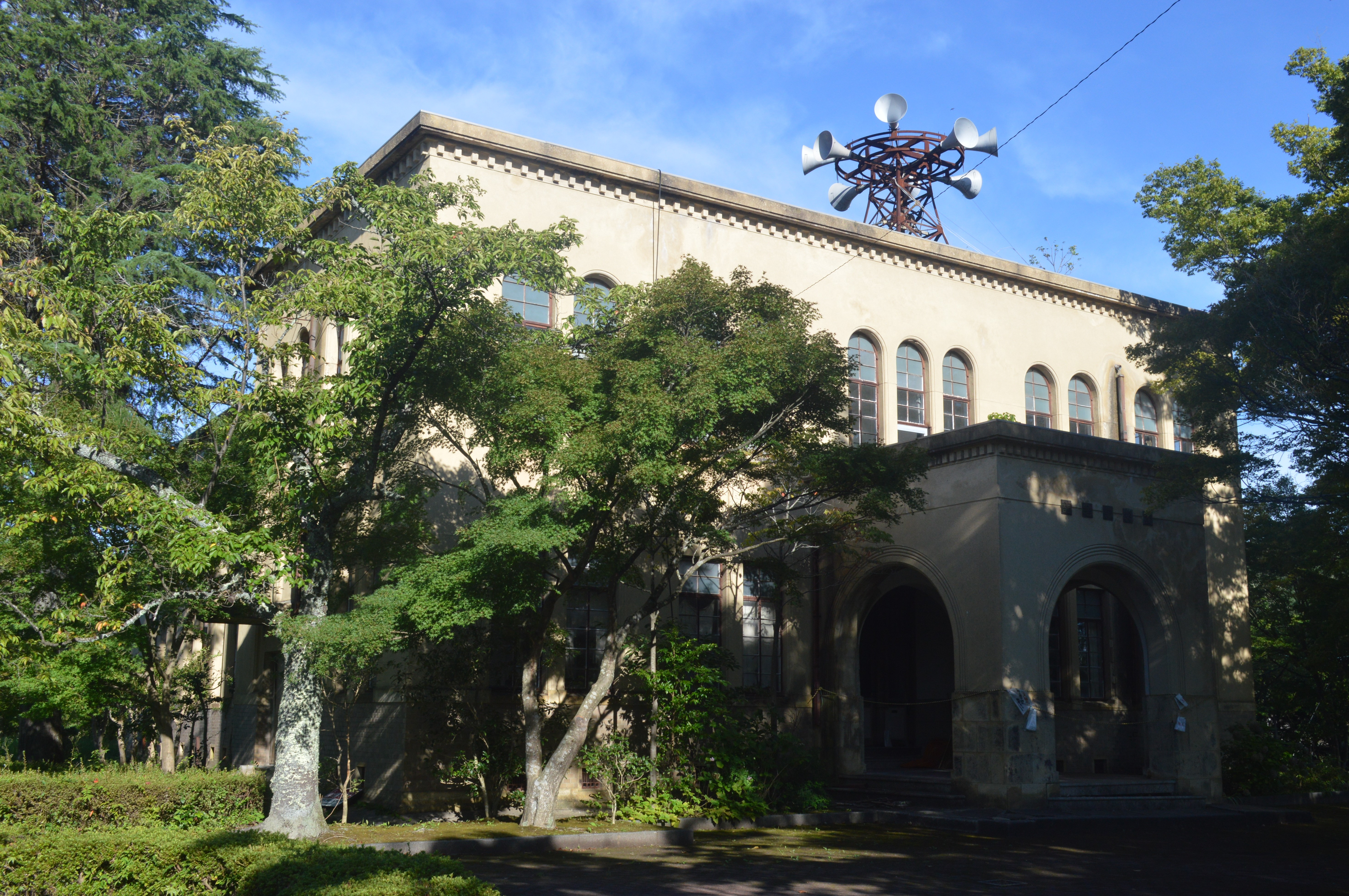 京都府京丹後市にある丹後震災記念館。